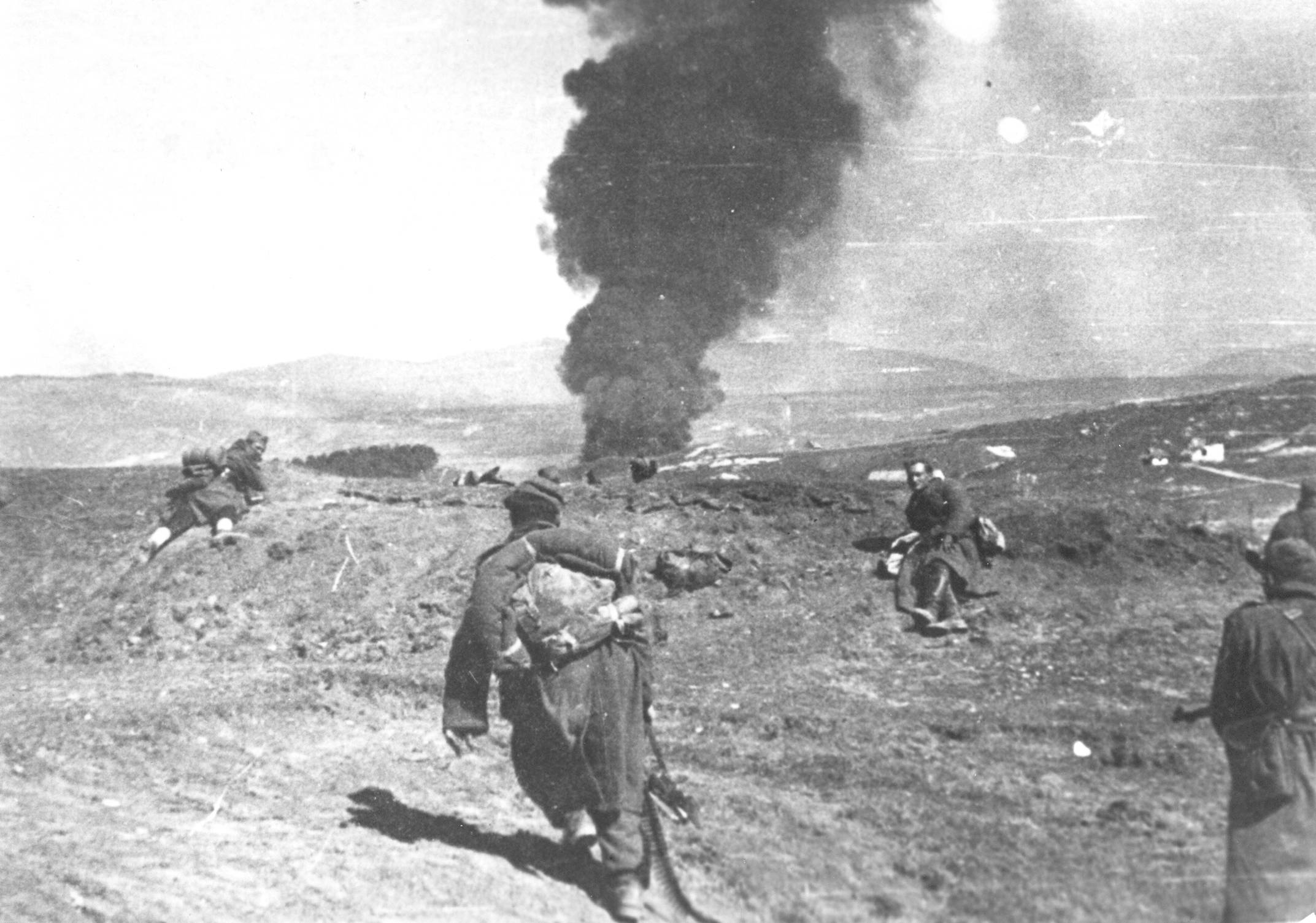 Srpskohrvatski / српскохрватски: Borba za Bihać marta 1945.